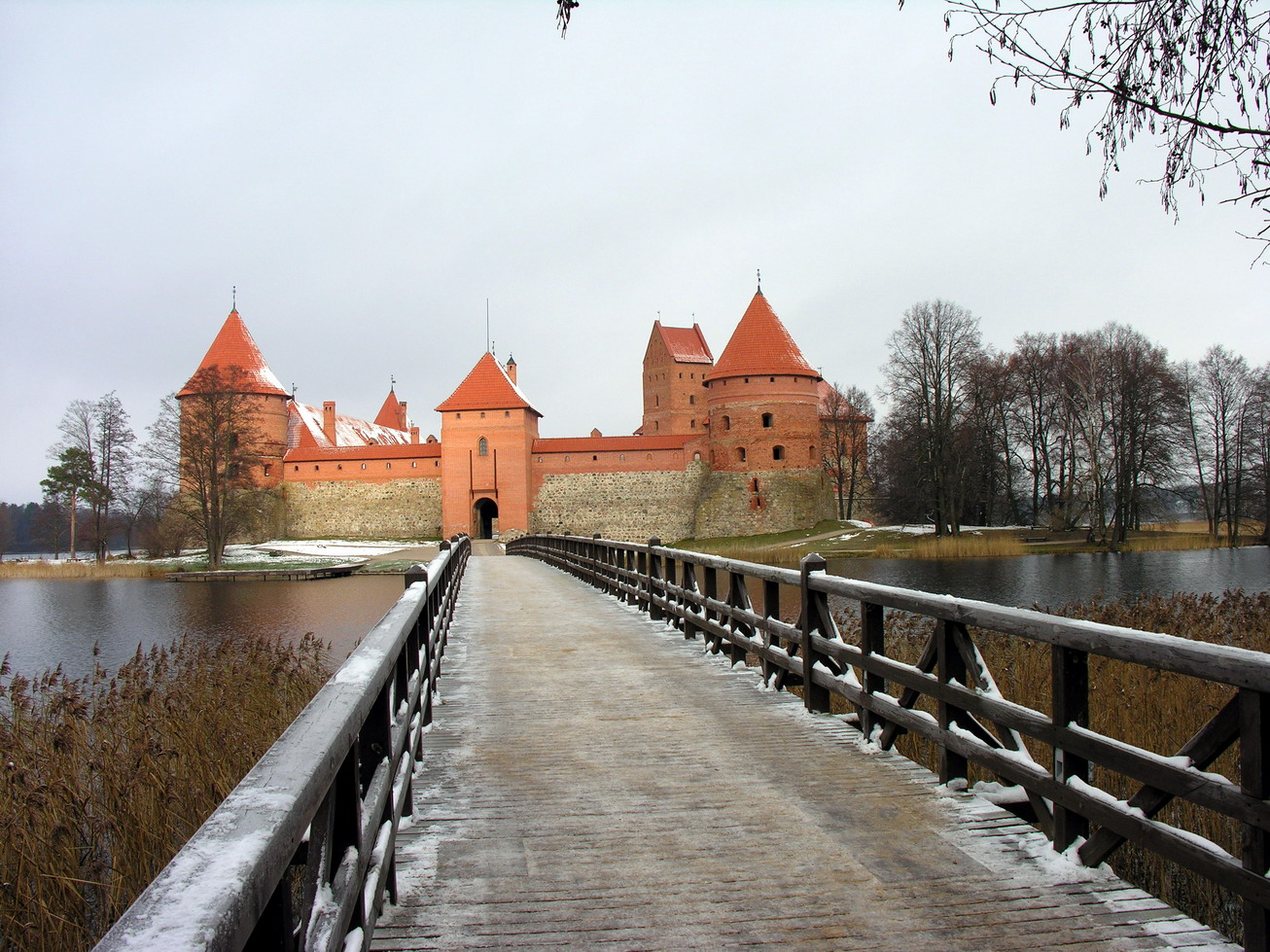 Žemaitėška: Trakū pėlės, 2007 m. lapkrėtė 16 d.